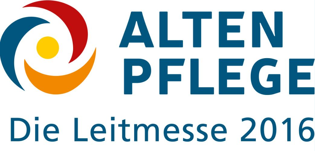 Das Foto zeigt das Logo zur Altenpflege Messe 2016.